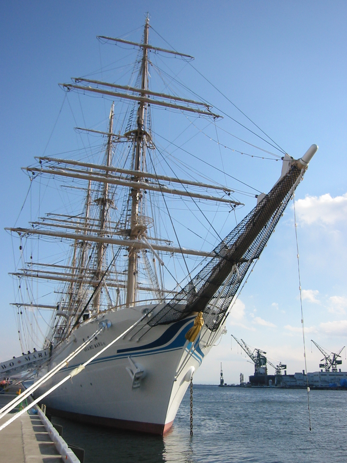 海王丸II世 メリケンパーク中突堤にて